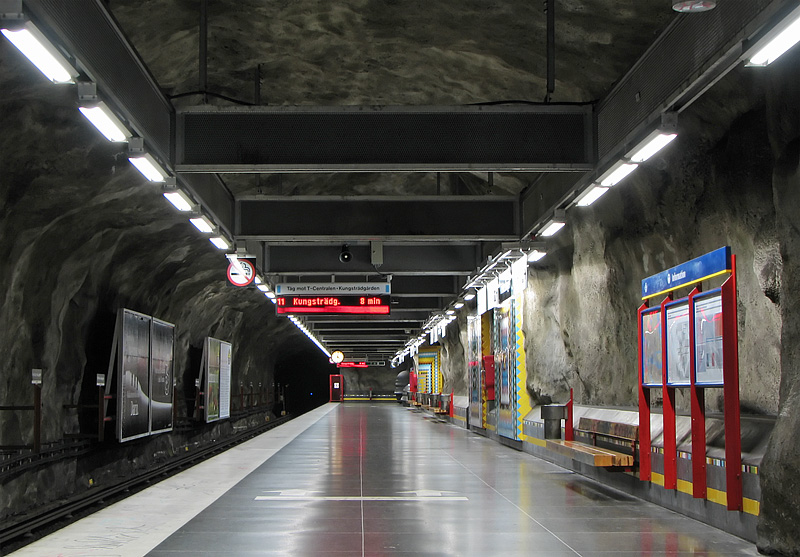 Västra Skogen subway station in Stockholm, Sweden